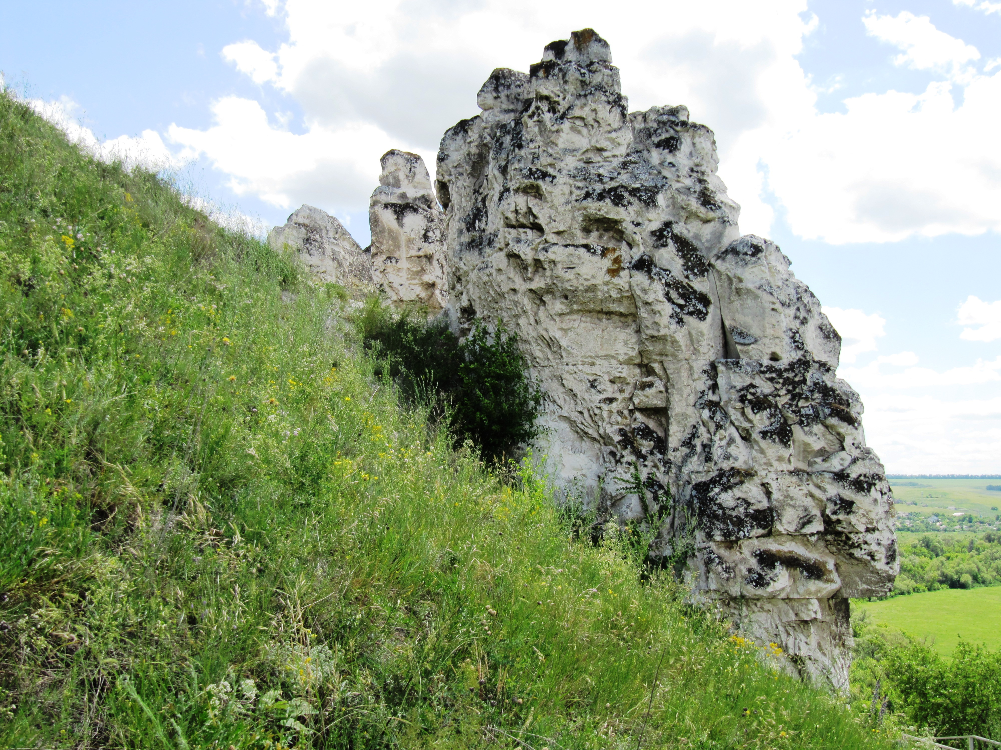 Меловой останец Дивногорья. Лискинский район.